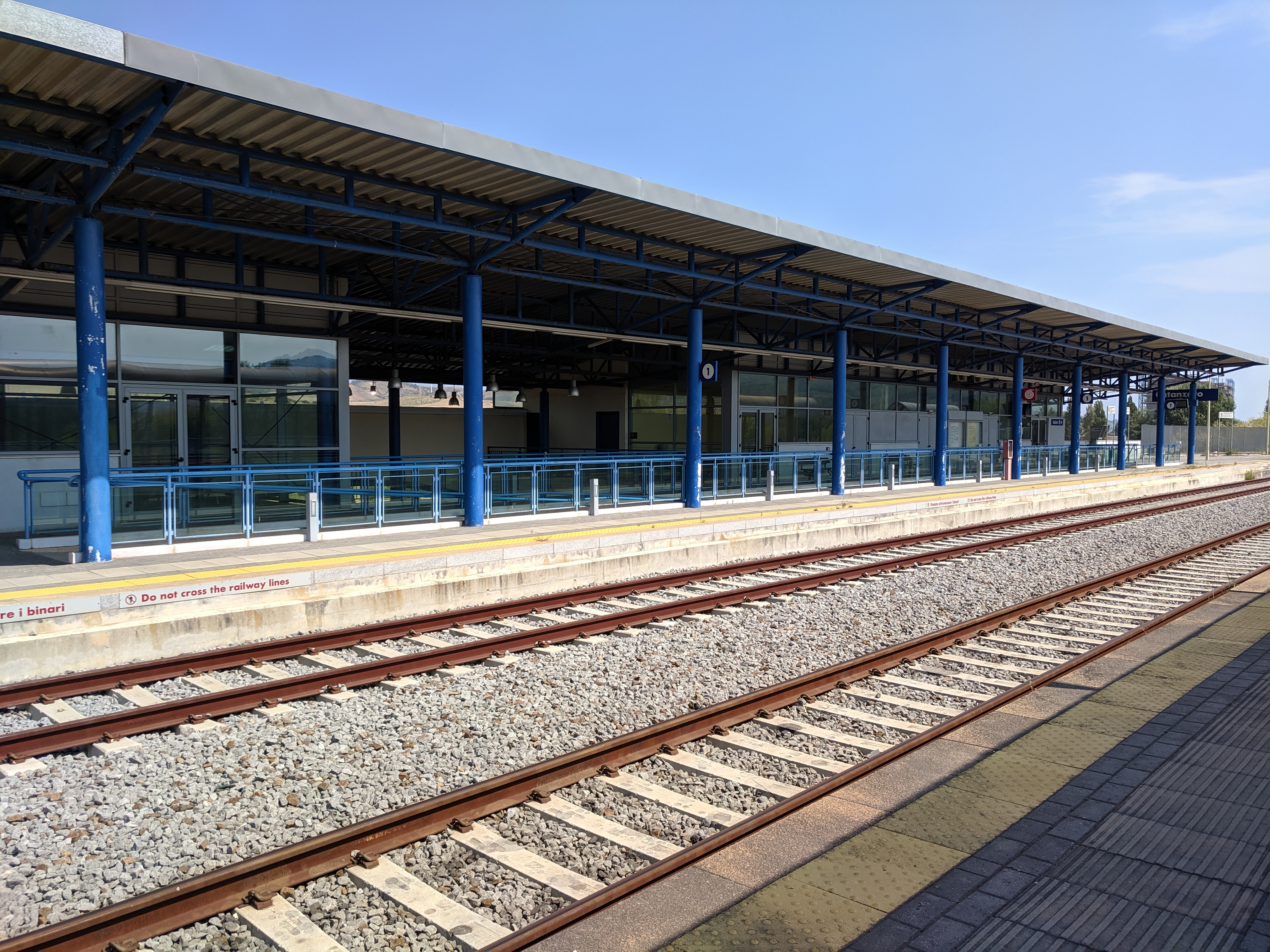 Vista binari della nuova stazione di Catanzaro Germaneto